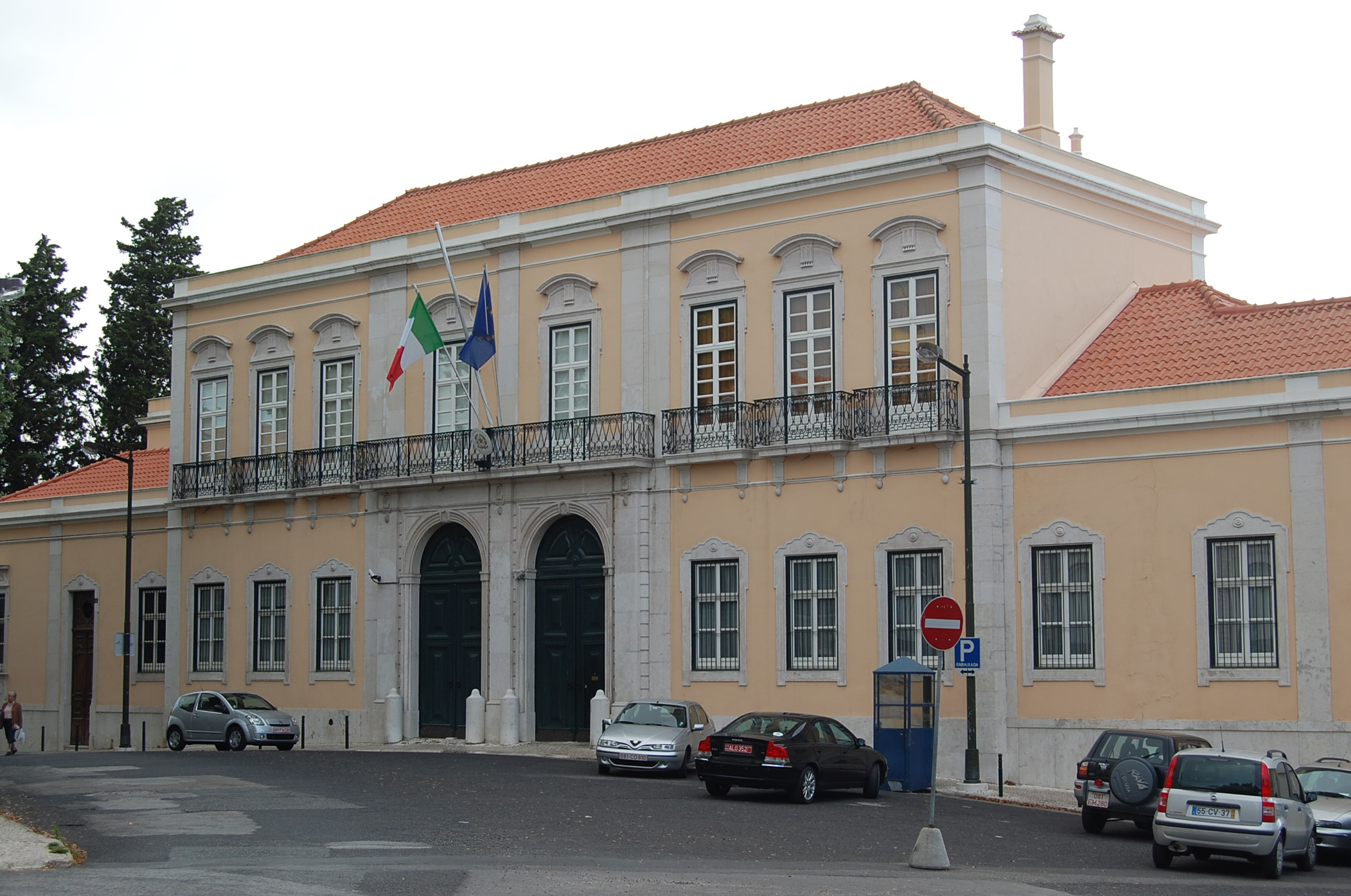 Sede dell'Ambasciata d'Italia a Lisbona.